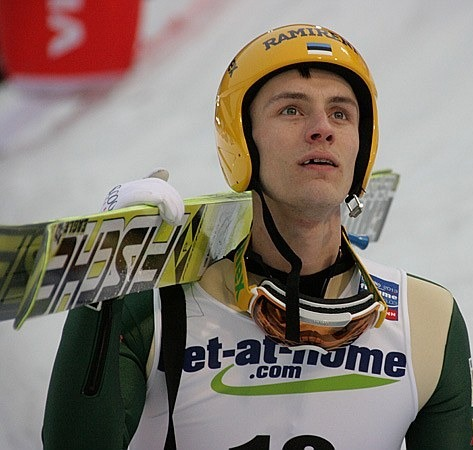 Kaarel Nurmsalu podczas konkursu indywidualnego mężczyzn na skoczni normalnej w ramach Mistrzostw Świata 2013.